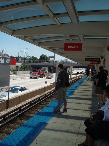 Photo de la station Grafield sur la ligne rouge